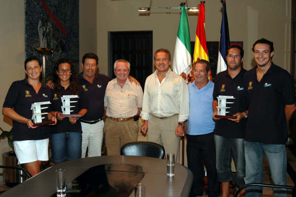 Pedro Pacheco, teniente de alcalde de Jerez, recibe al Club Natación Jerez (2006).